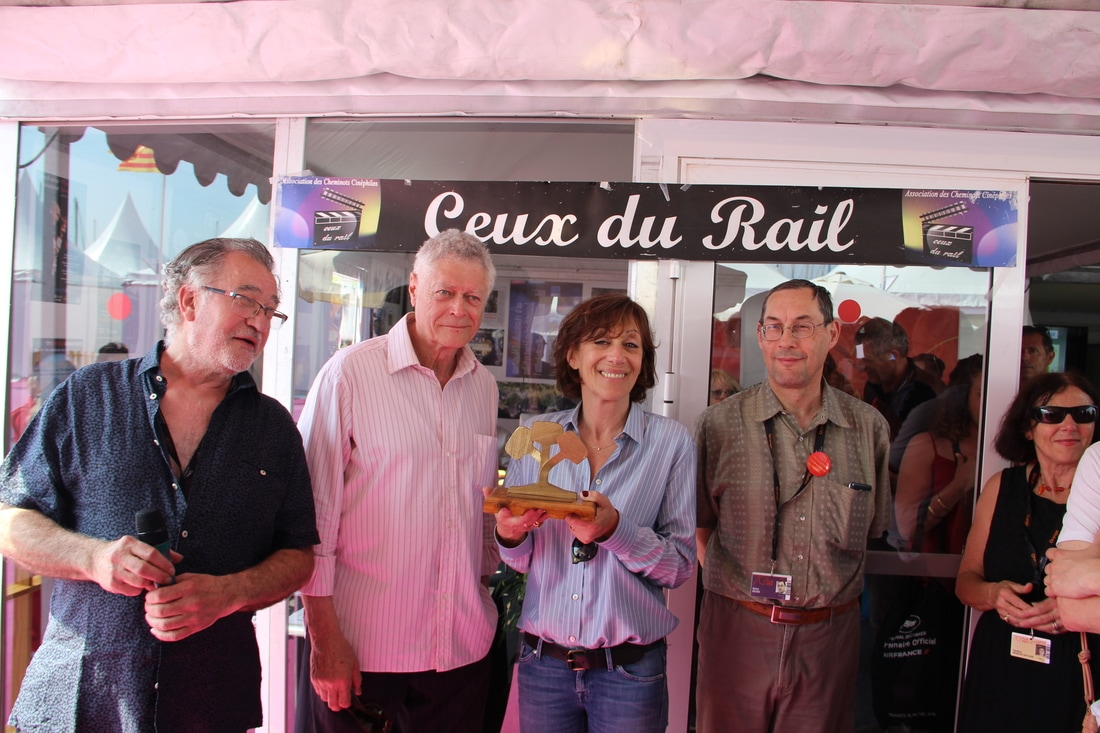 Rails d'or 2017 : Michèle Halberstadt, aux côtés de Pierre William Glenn, représente Ali Soozandeh pour TEHERAN TABOU